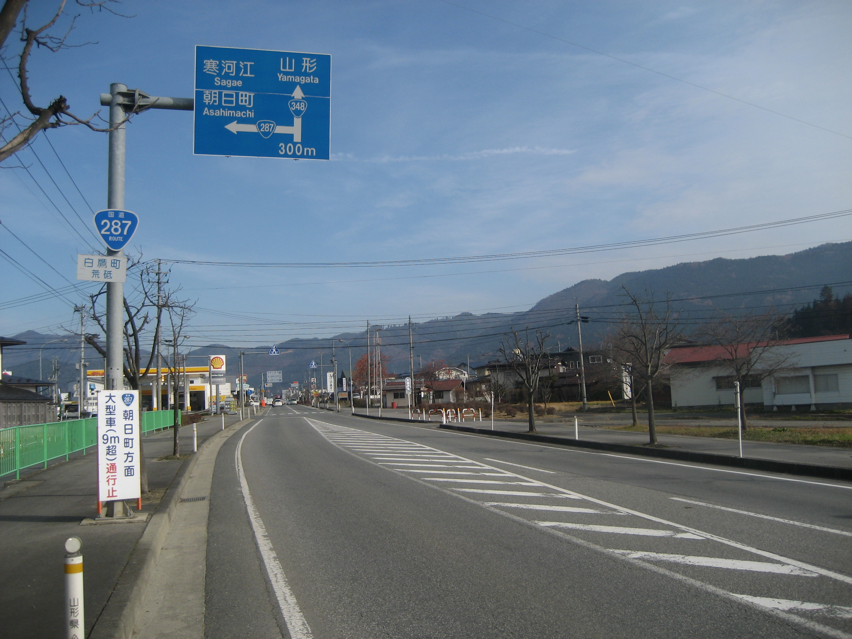 国道287号線山形県白鷹町荒砥付近（寒河江方面を撮影）